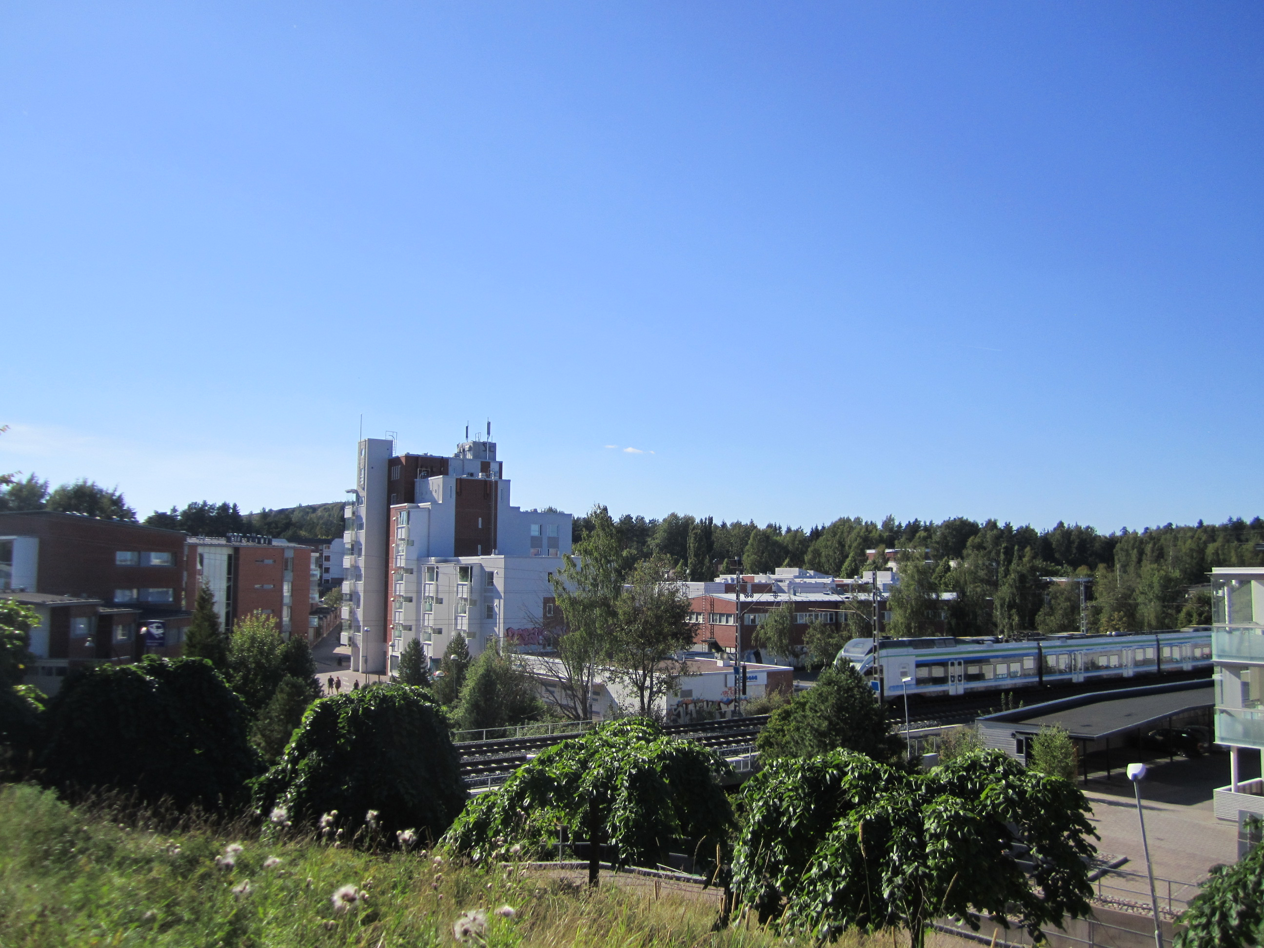 Kuvassa näkyvät Vantaankosken rata, Auroranlinna sekä taustalla Malminkartanonhuippu